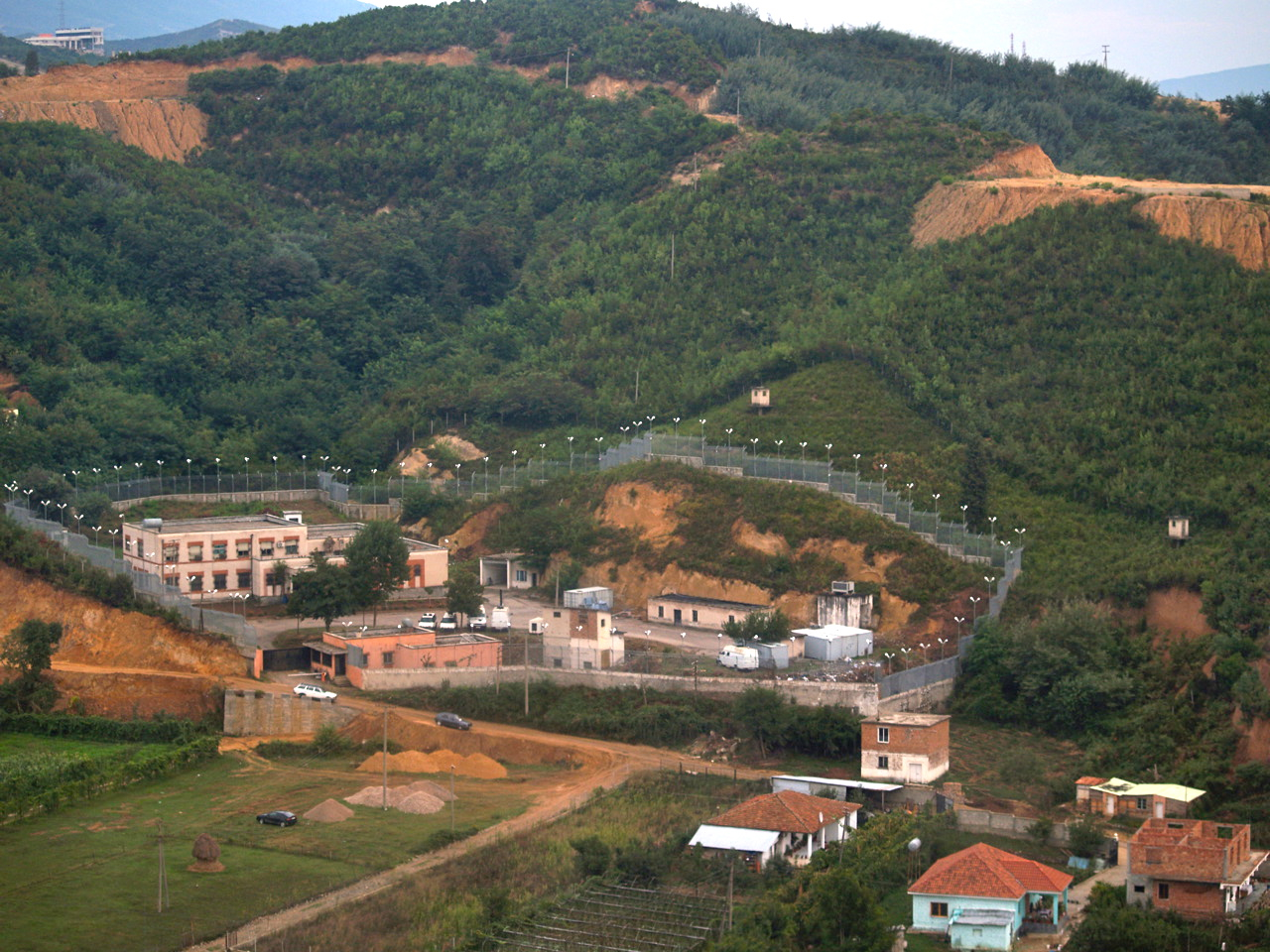 Burgu i Tiranes